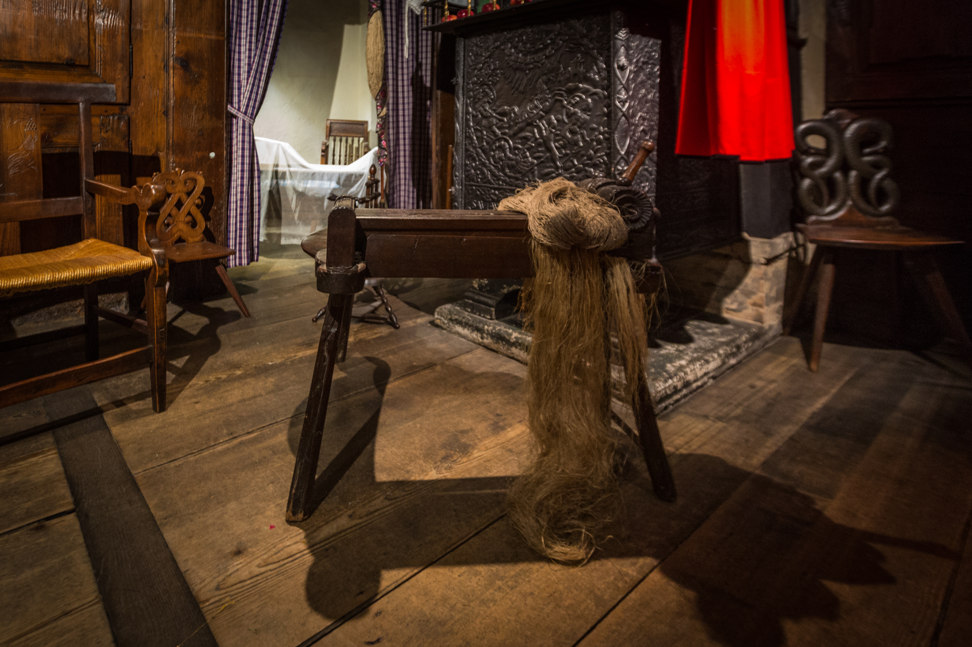 Broie (ou macque) à chanvre manuel en bois servantà broyer ou briser la tige du chanvre - ou du lin.